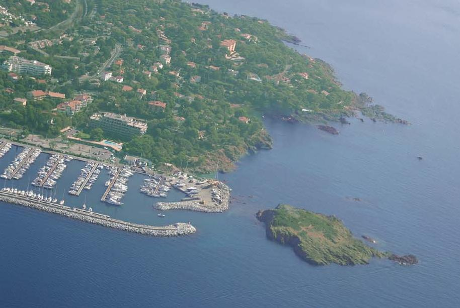 Lion de terre (Saint-Raphaël, France)